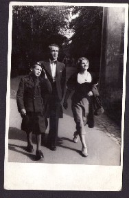 Mladý Dalibor Brochard (vlevo) se svou rodinou a ještě žíjícím otcem.